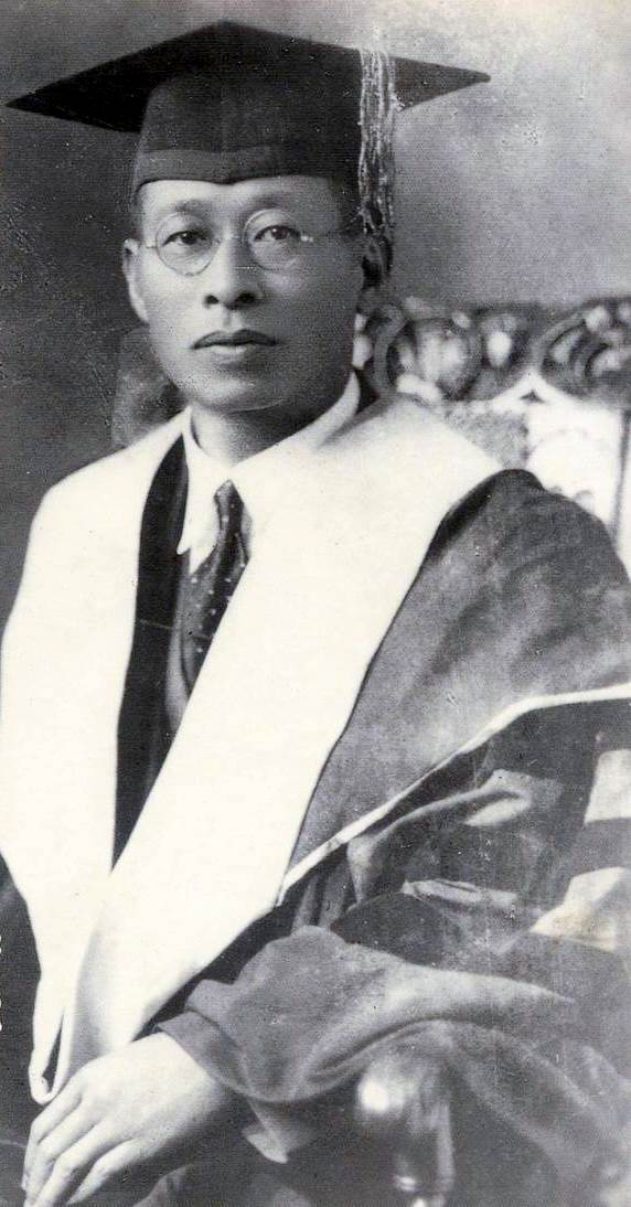 哥倫比亞大學哲學博士林茂生